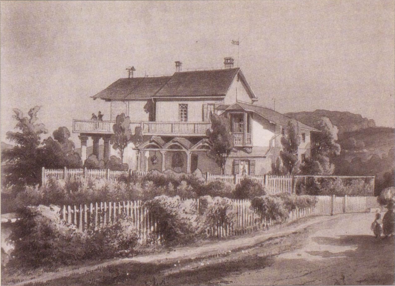 Villa Heidehaus von Friedrich Wilhelm Hackländer, Stuttgart, Aquarell von Hermann Herdtle sen., 1852.